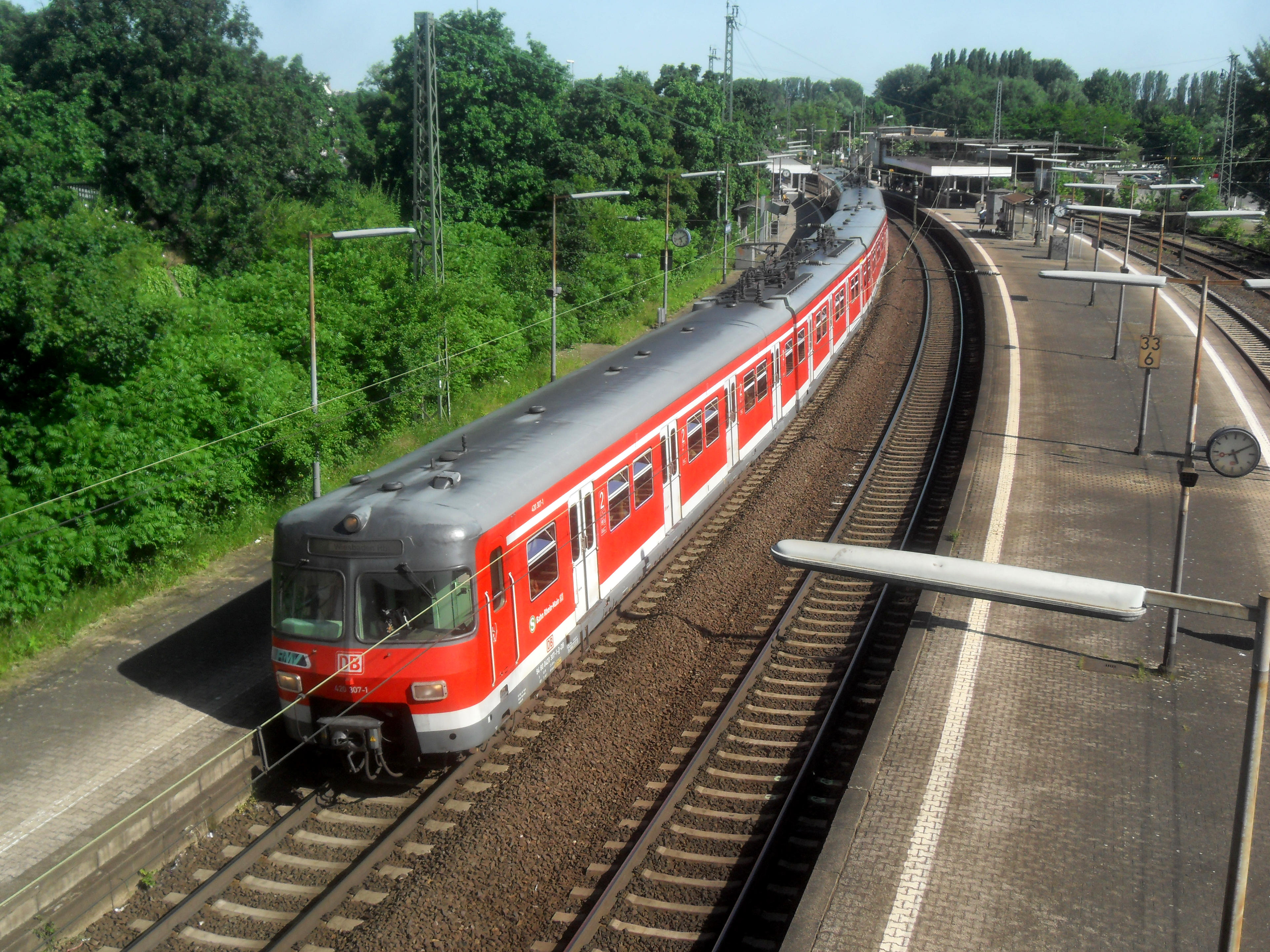 Triebwagen der DB-Baureihe 420 der S-Bahn Rhein-Main auf der Taunus-Eisenbahn im Mainz-Kasteler Bahnhof auf dem Weg nach Wiesbaden in Hessen (Deutschland)